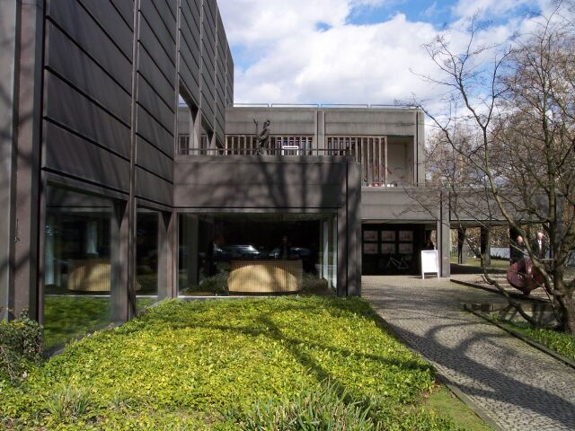 Bild aus Bochum, eigene Aufnahme, GFDL